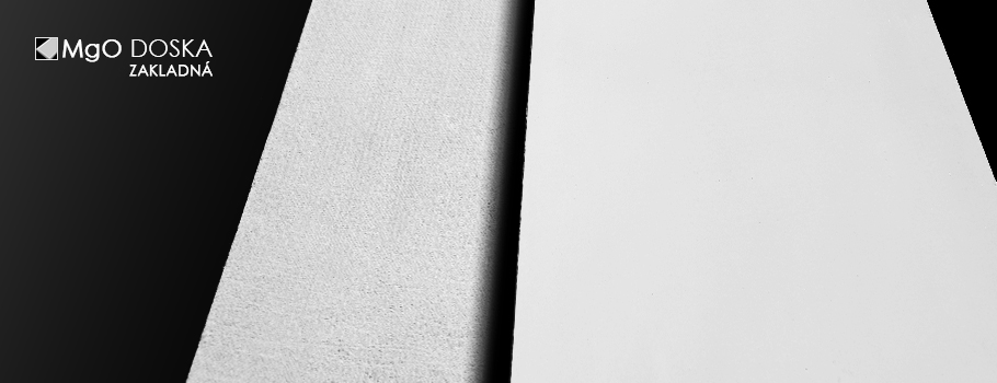 MgO doska